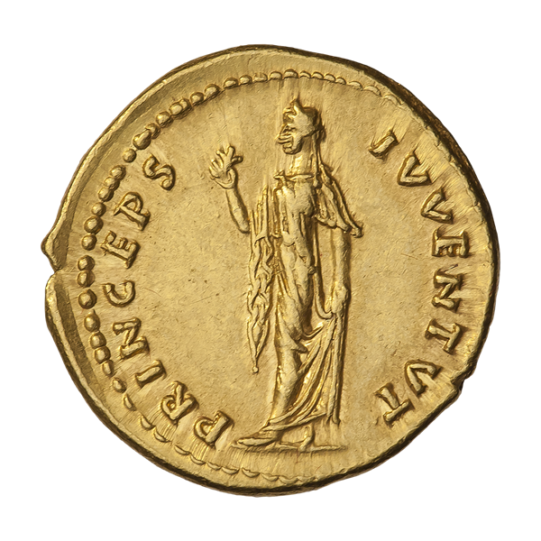 Ауреус. Домициан, цезарь. Ок. 74 г. (реверс). Надпись PRINCEPS IVVENTVT. Шагающая влево Спес (персонификация надежды); в поднятой правой руке цветок, левой рукой приподнимает край платья.